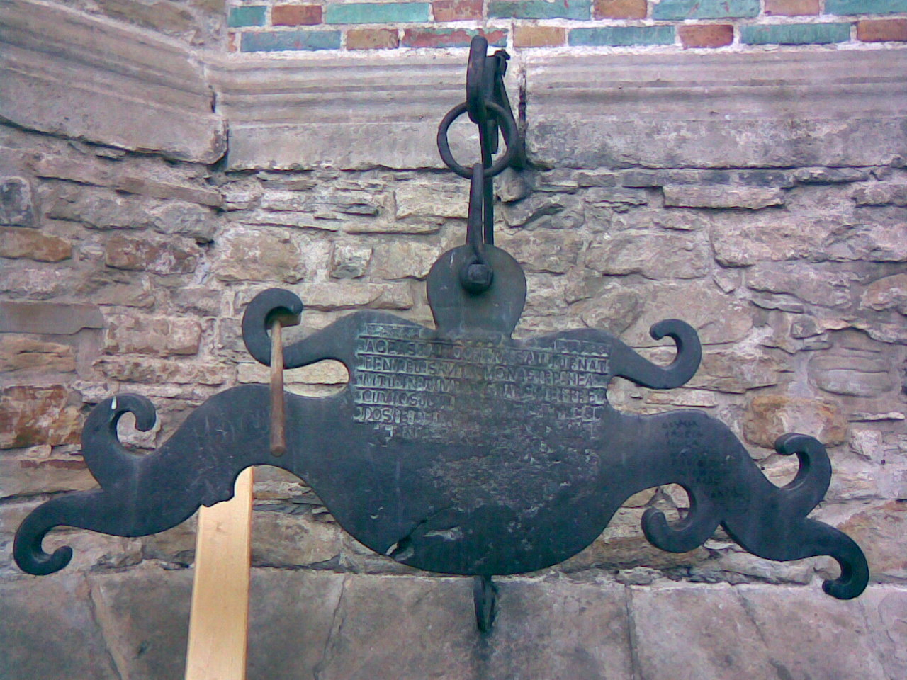 Toaca mănăstirii Neamţ